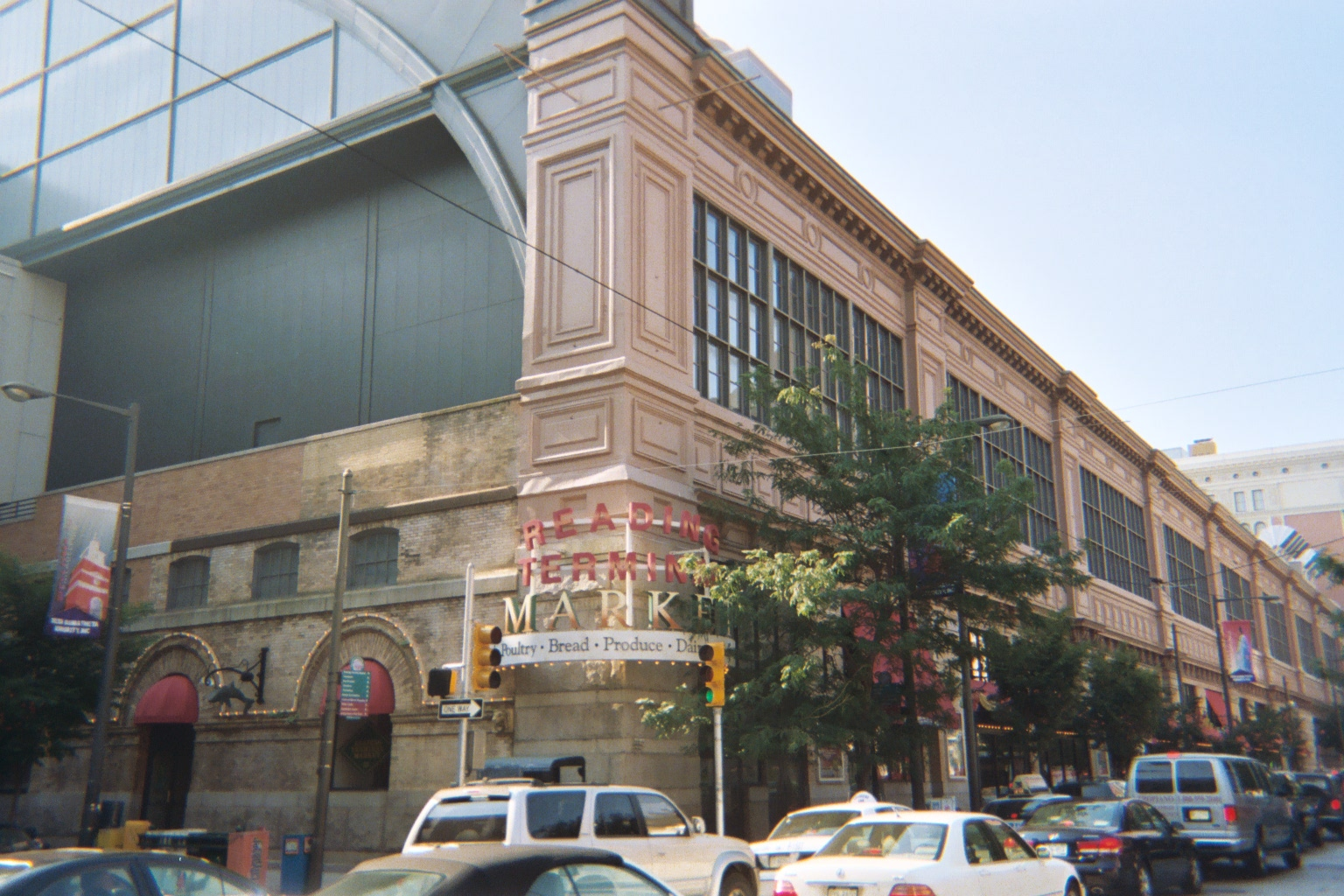 Reading Terminal Market